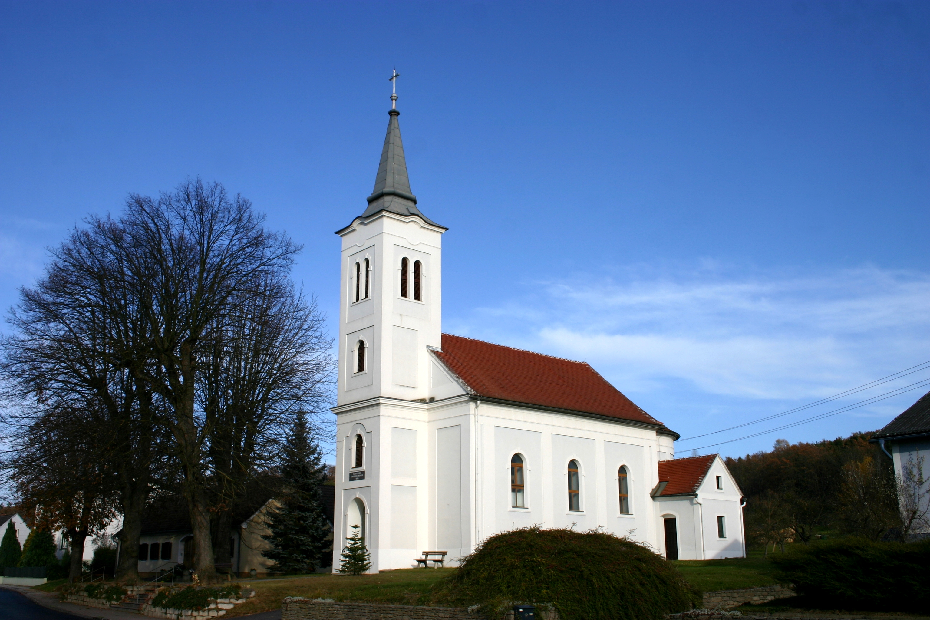 Deutsch Kaltenbrunn römisch-katholische Filialkirche im Ortsteil Rohrbrunn